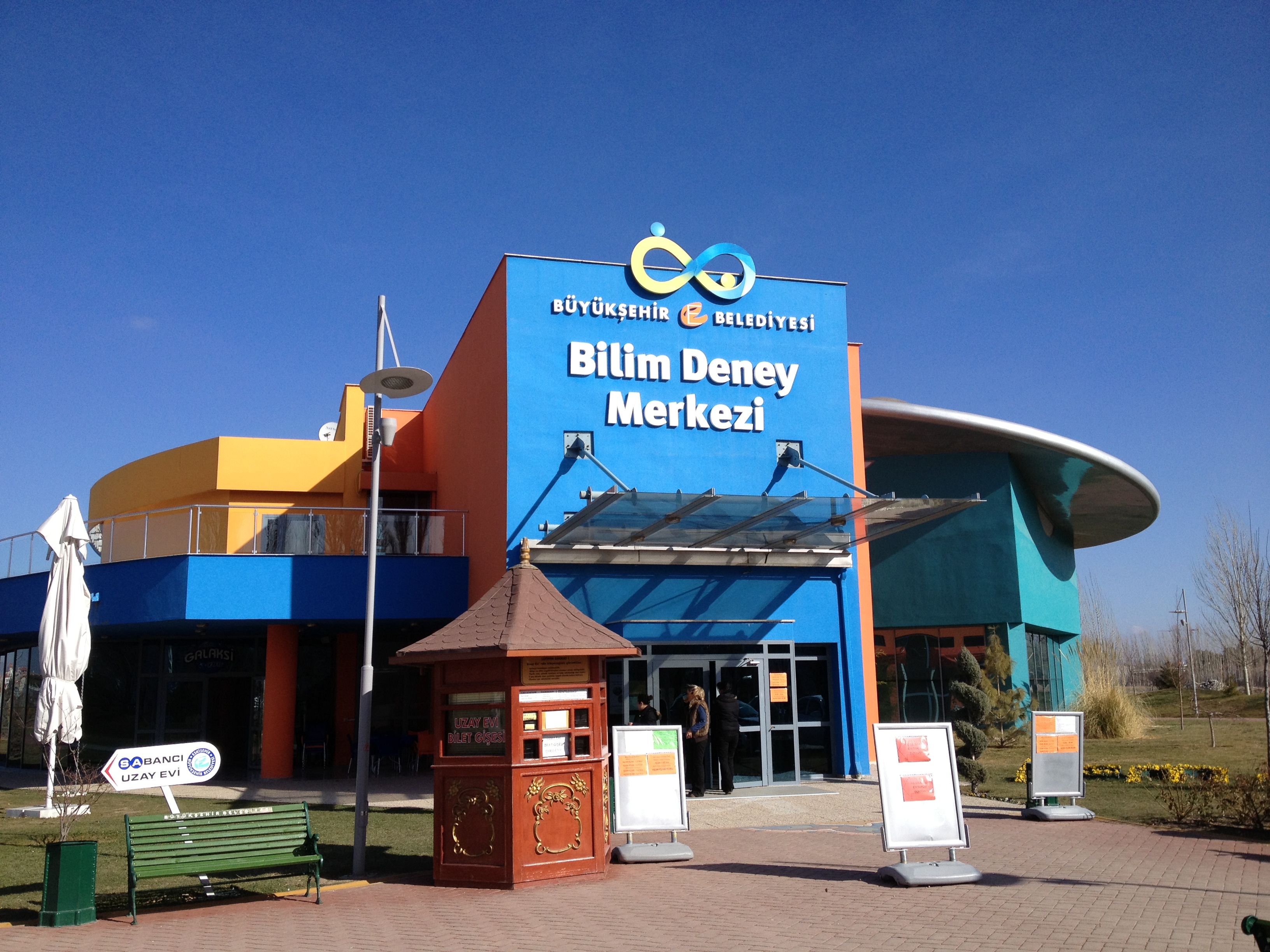 Eskişehir Bilim Deney Merkezi